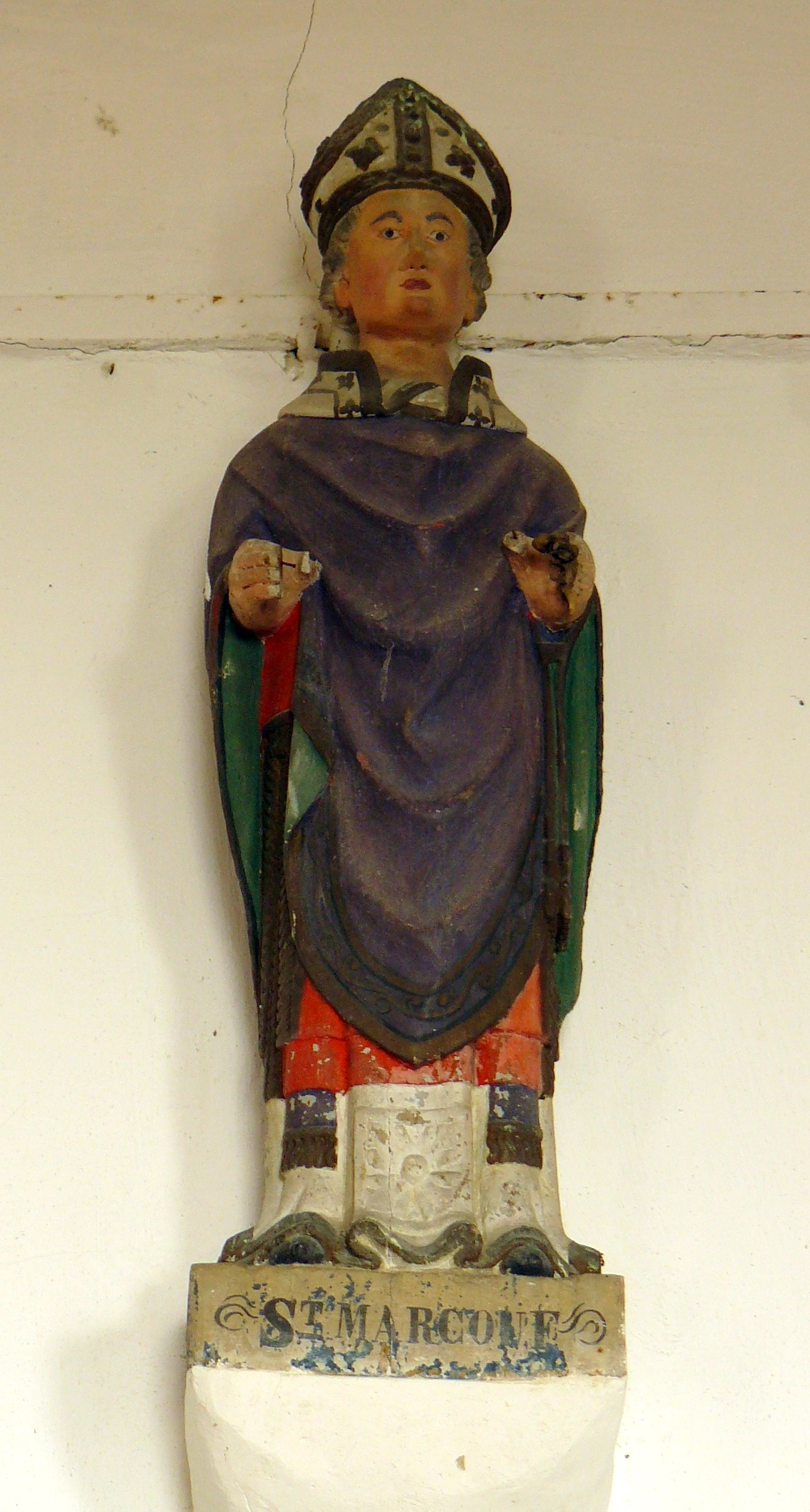 Statuette de Saint Marcouf (ou Marcoul, Marcoult, etc). Chapelle Saint-Michel de Clermont-en-Auge (Calvados, France).